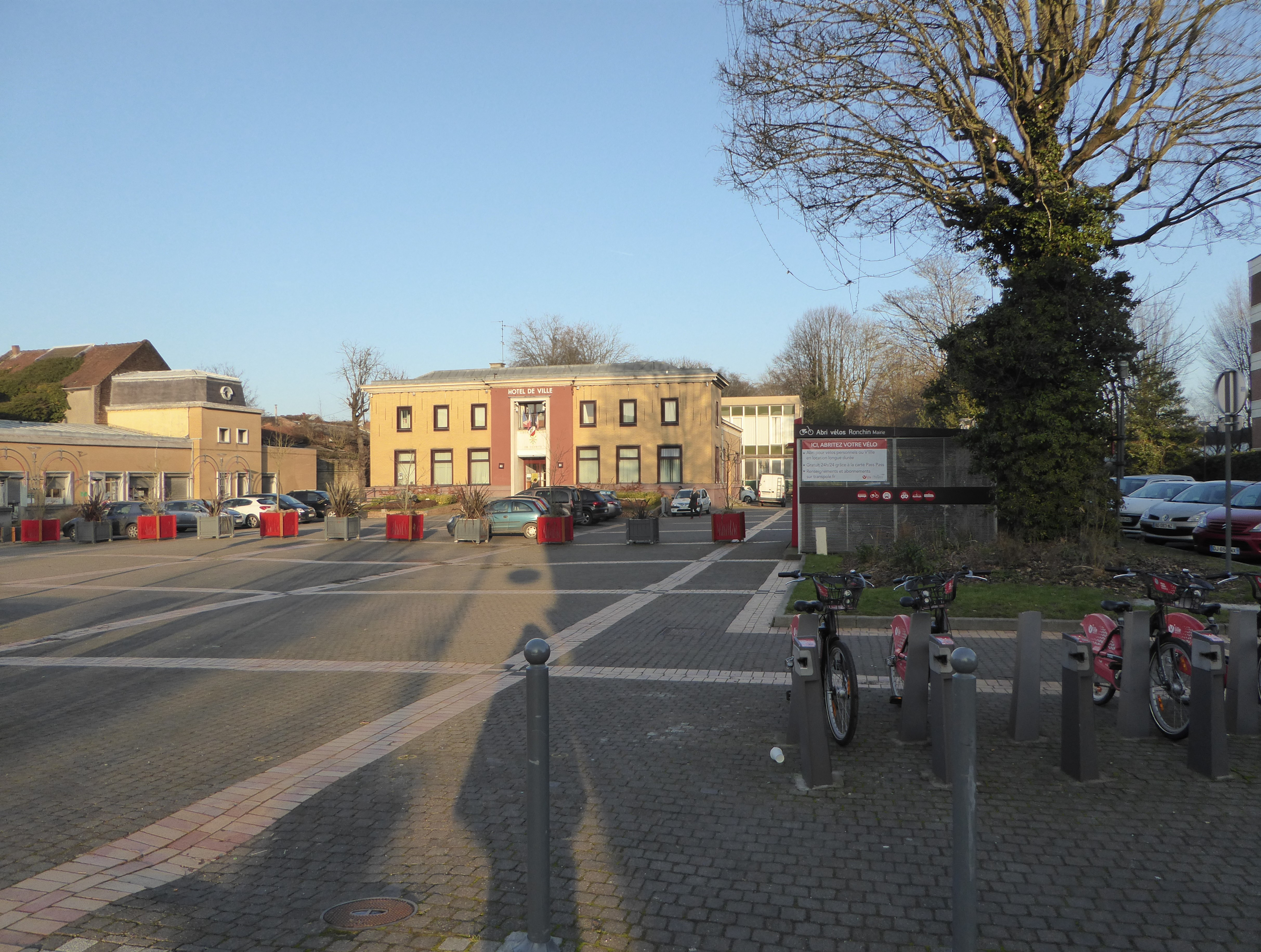 L' Hôtel de Ville de Ronchin, 'l'ancien Château Lamblin) Nord.- France